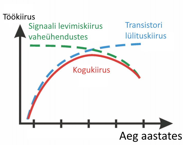 Transistoride mõõdu vähenemisega tõuseb integraalskeemide töökiirus. Suuremat mõju kiirusele hakkab avaldama vaheühendustes signaali levimiskiirus.